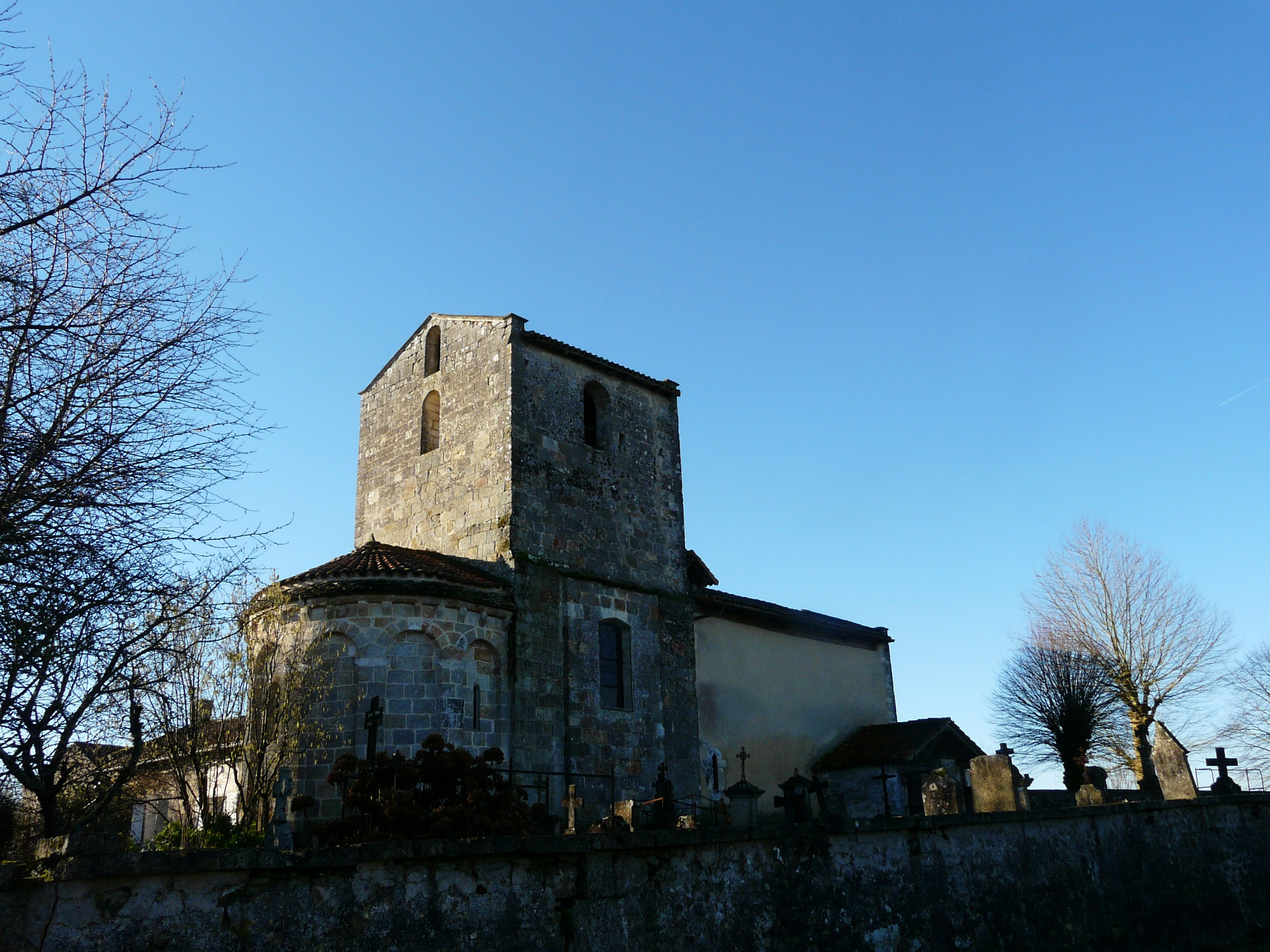 L'angle nord-est de l'église de Cantillac, Dordogne, France.